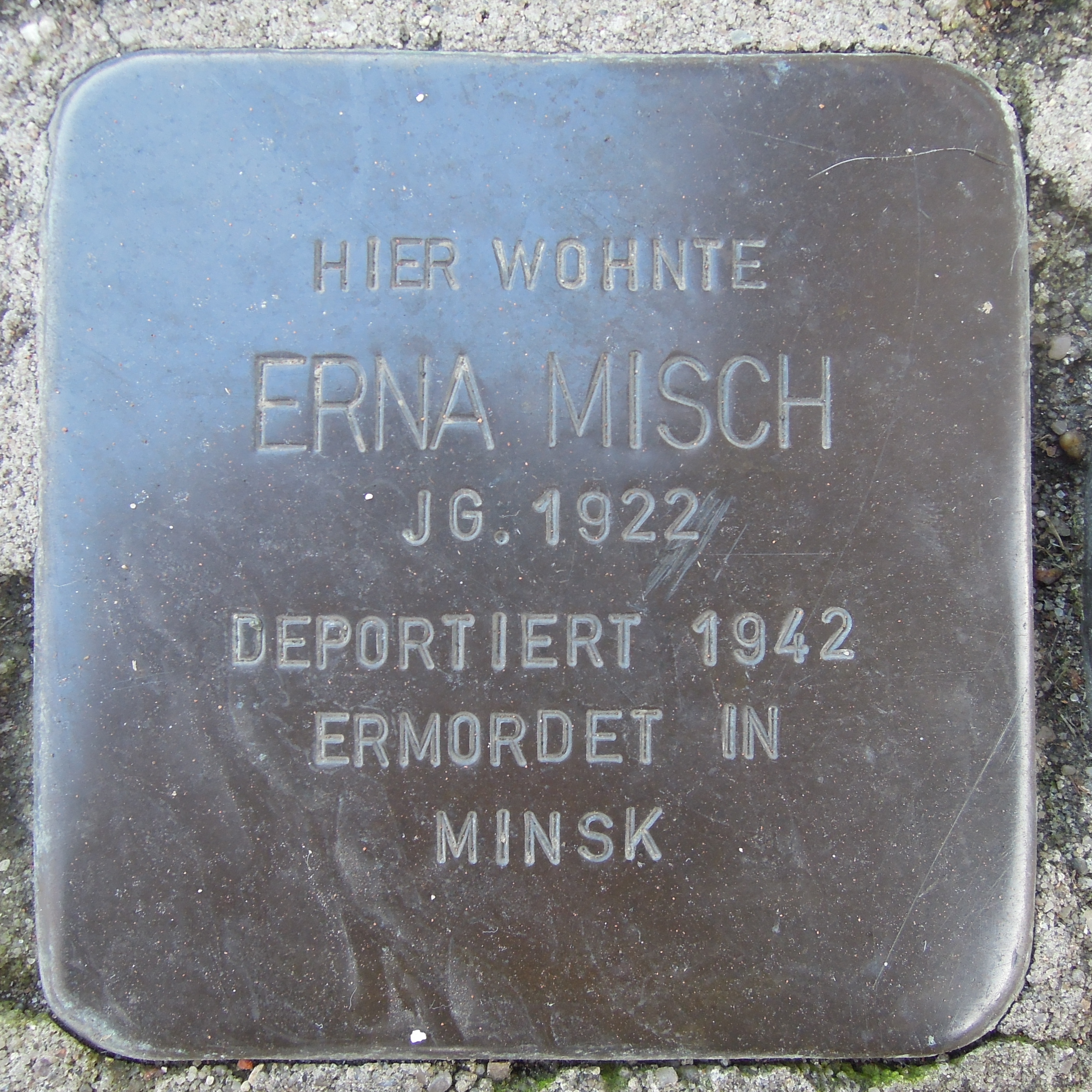 Stolperstein Alpen Bruckstraße 20 Erna Misch